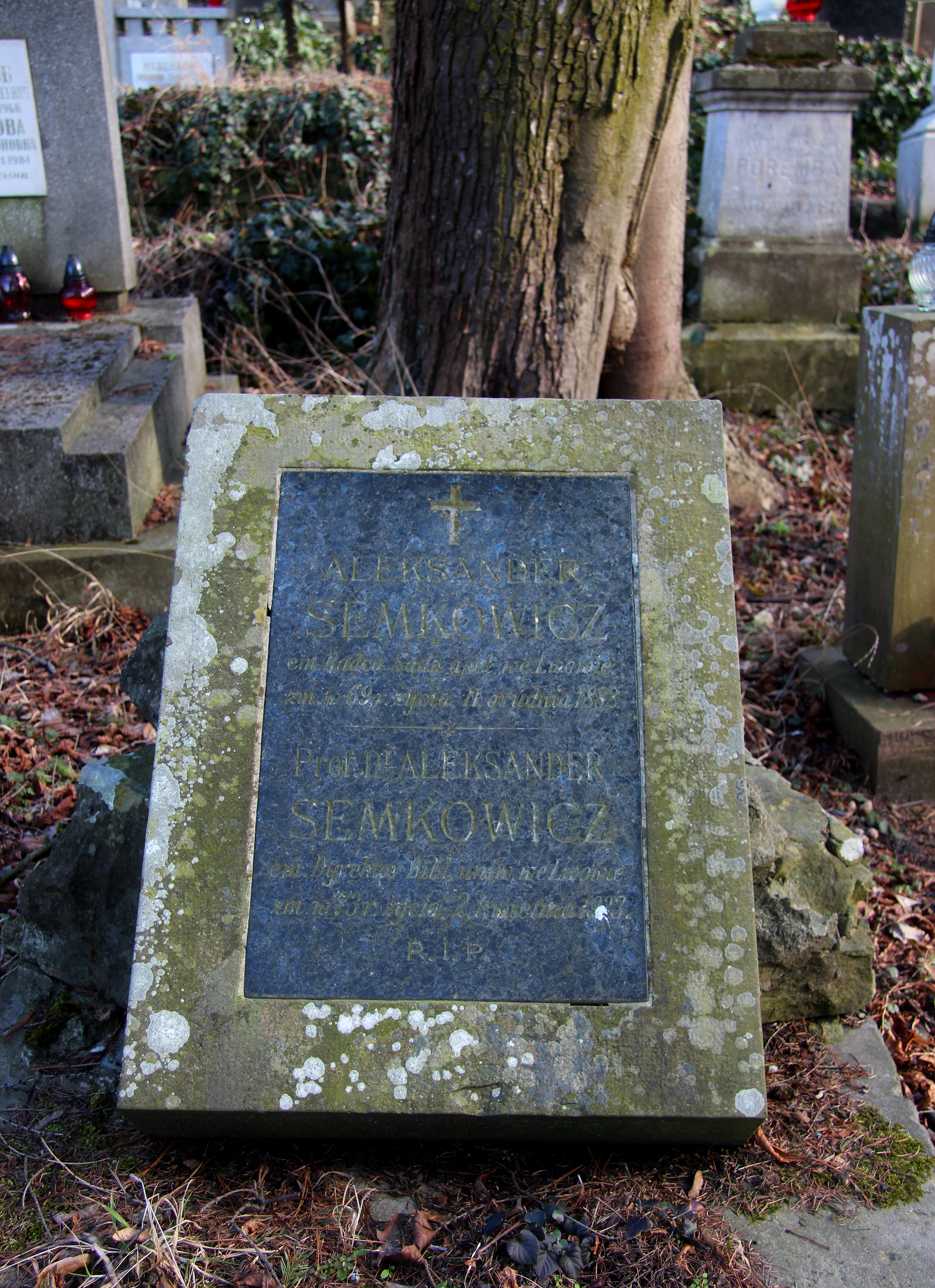 Могила історика , професора А. Семковича. Личакіський цвинтар , поле № 9.